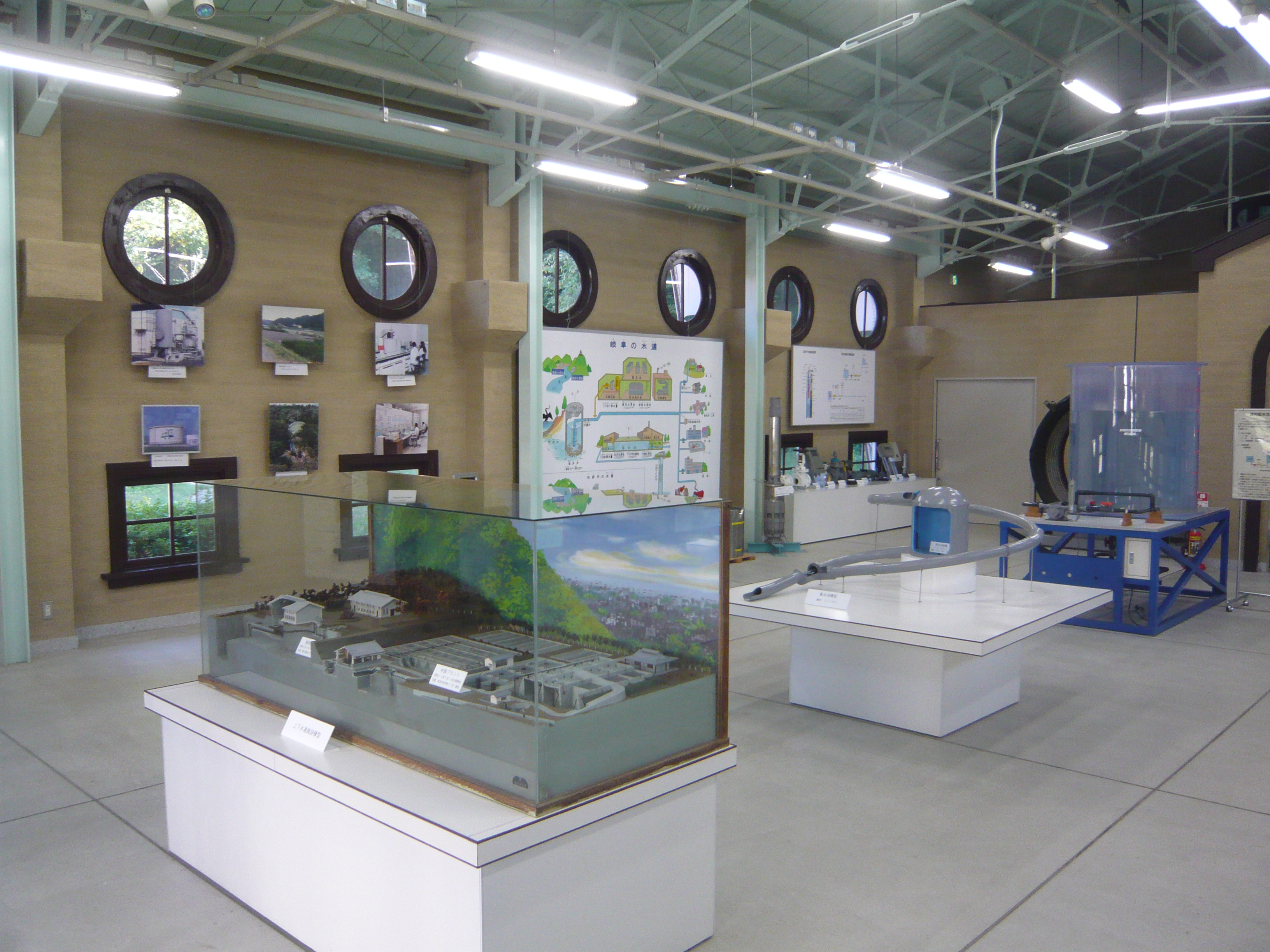 Water Museum（水の資料館 (岐阜市)）,Gifu,Gifu,Japan（岐阜県岐阜市）で撮影。